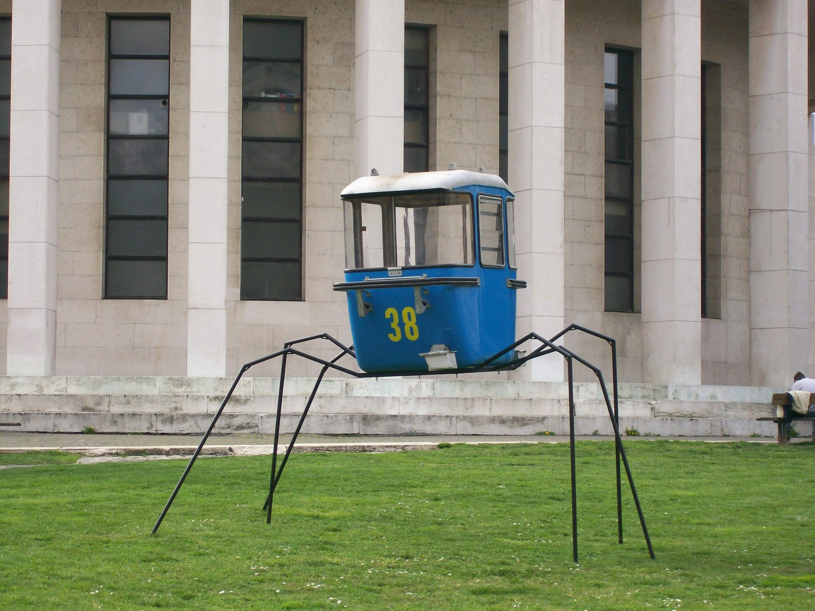 Umjetnička instalacija u Zagrebu (kabina stare žičare)